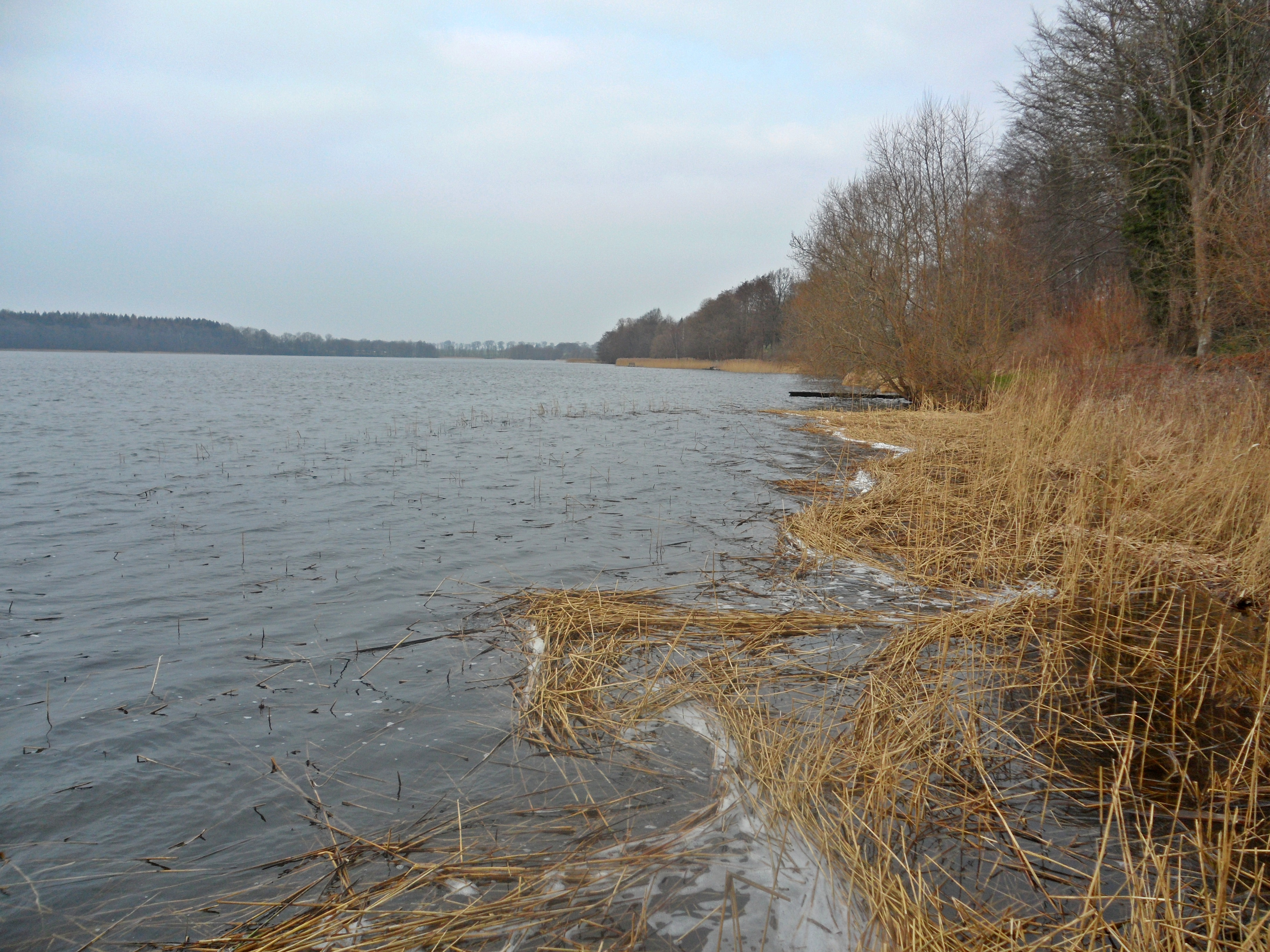 Belauer See an der Badestelle in Belau